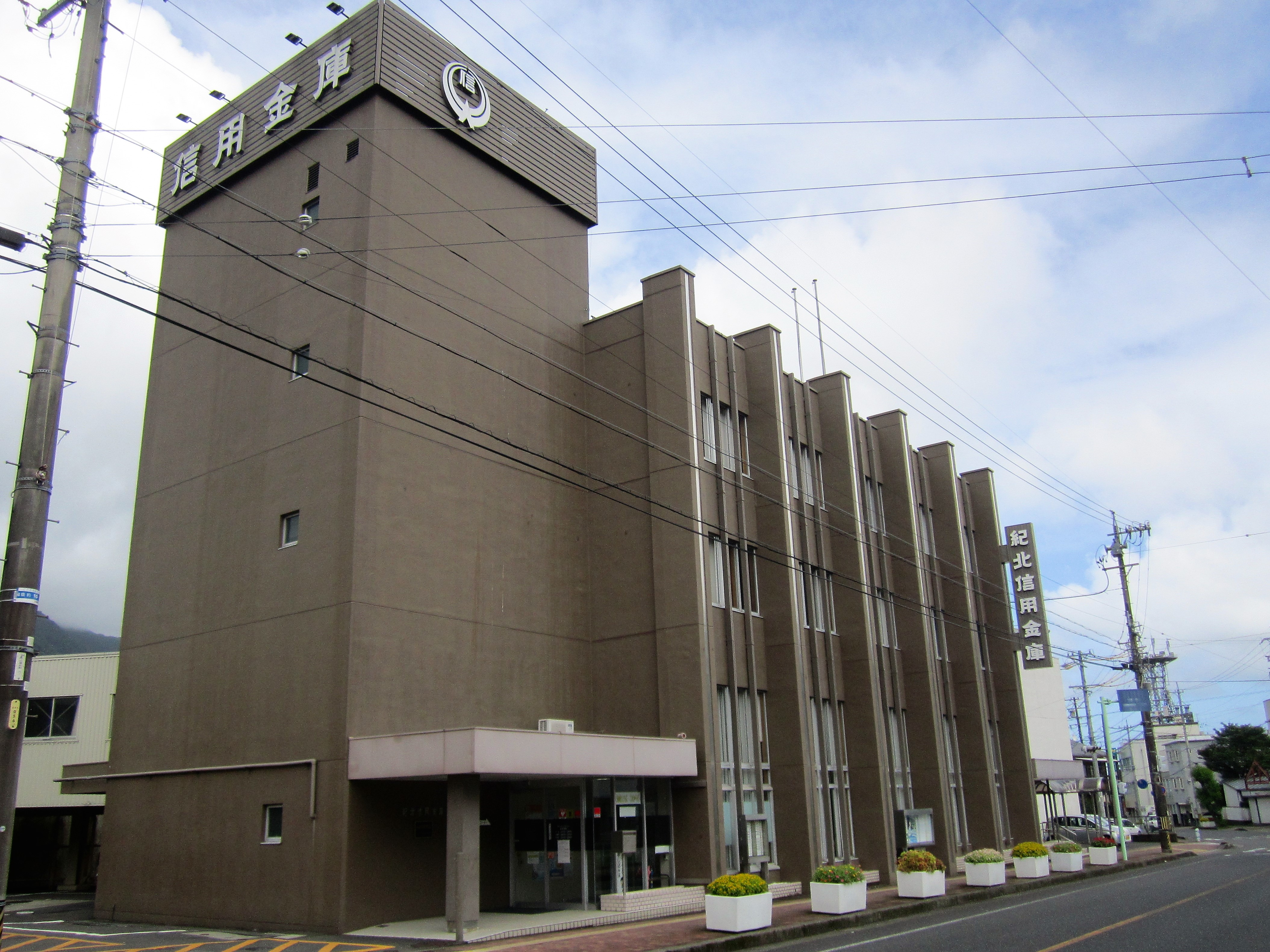 紀北信用金庫本店（尾鷲市野地町）